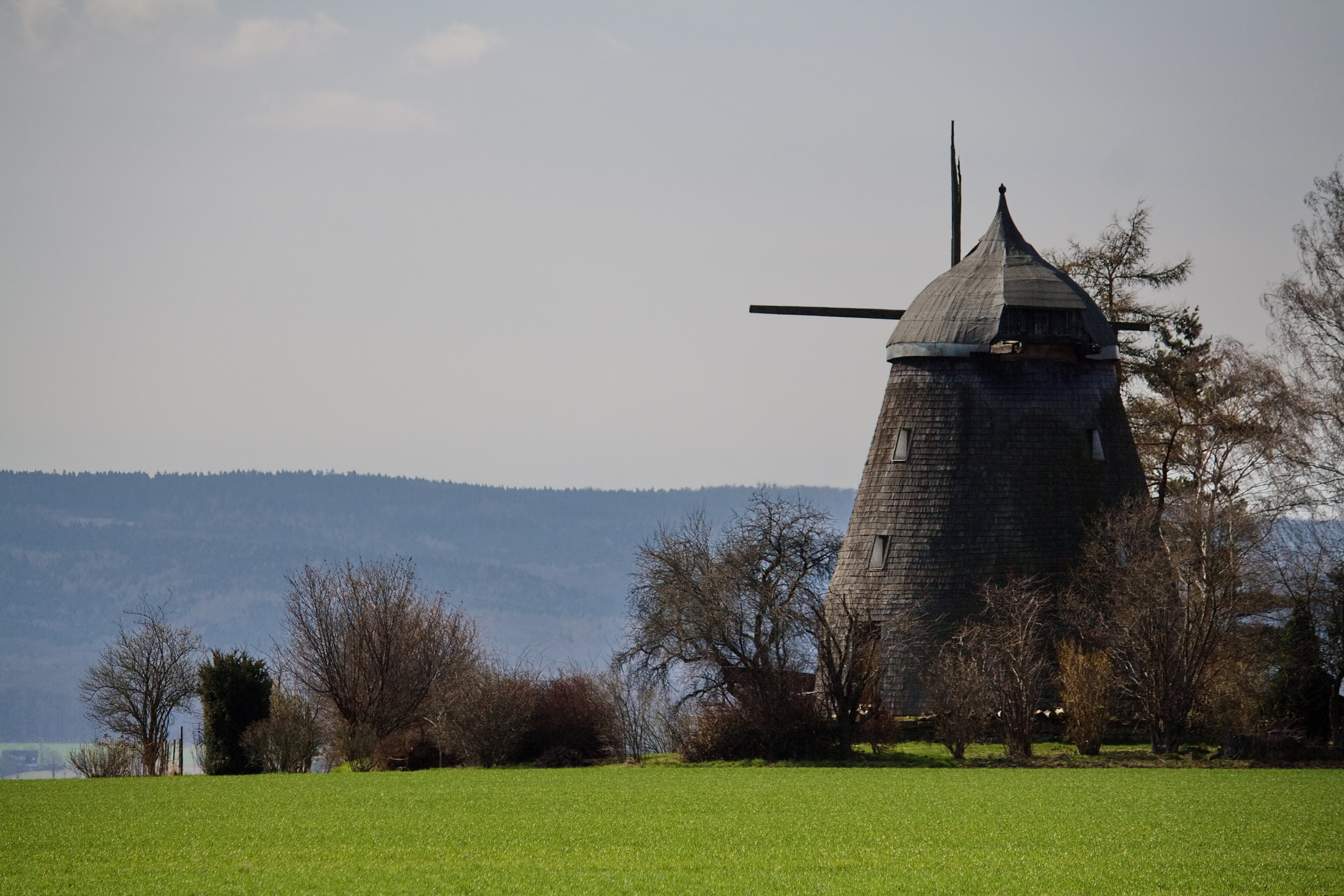 Windmühle vor Sorsum (Wennigsen), Niedersachsen, Deutschland